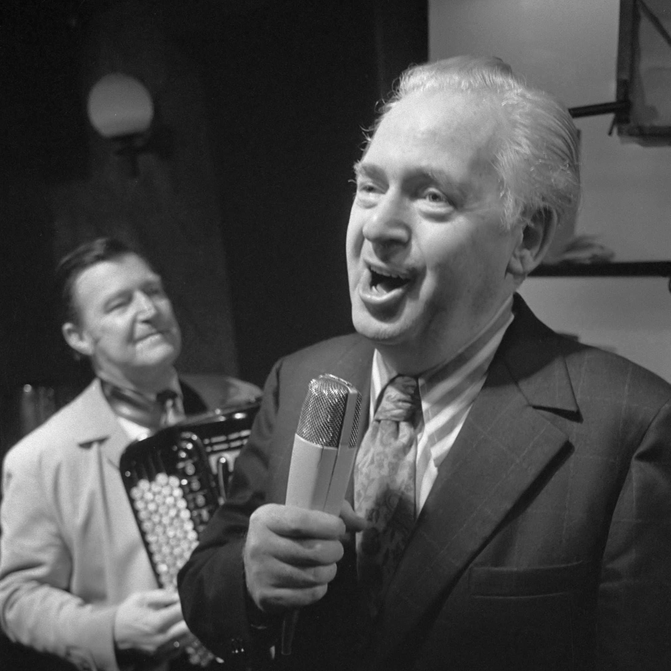 Zanger Leo Fuld treedt op in San Remo Bar Amsterdam, opdracht Haagsche Courant 22 november 1971